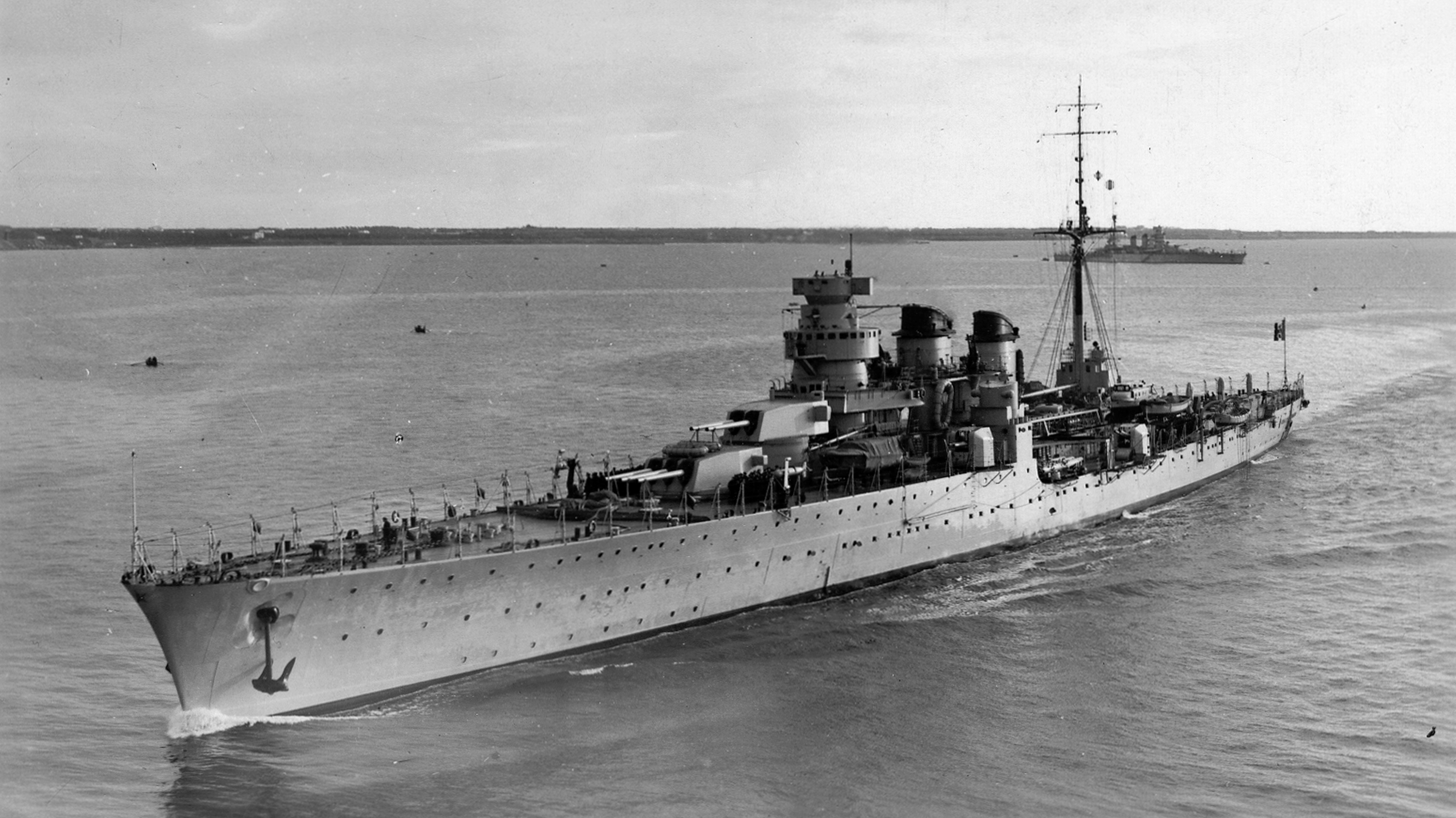 l'incrociatore leggero garibaldi nel 1938, al rientro a Taranto